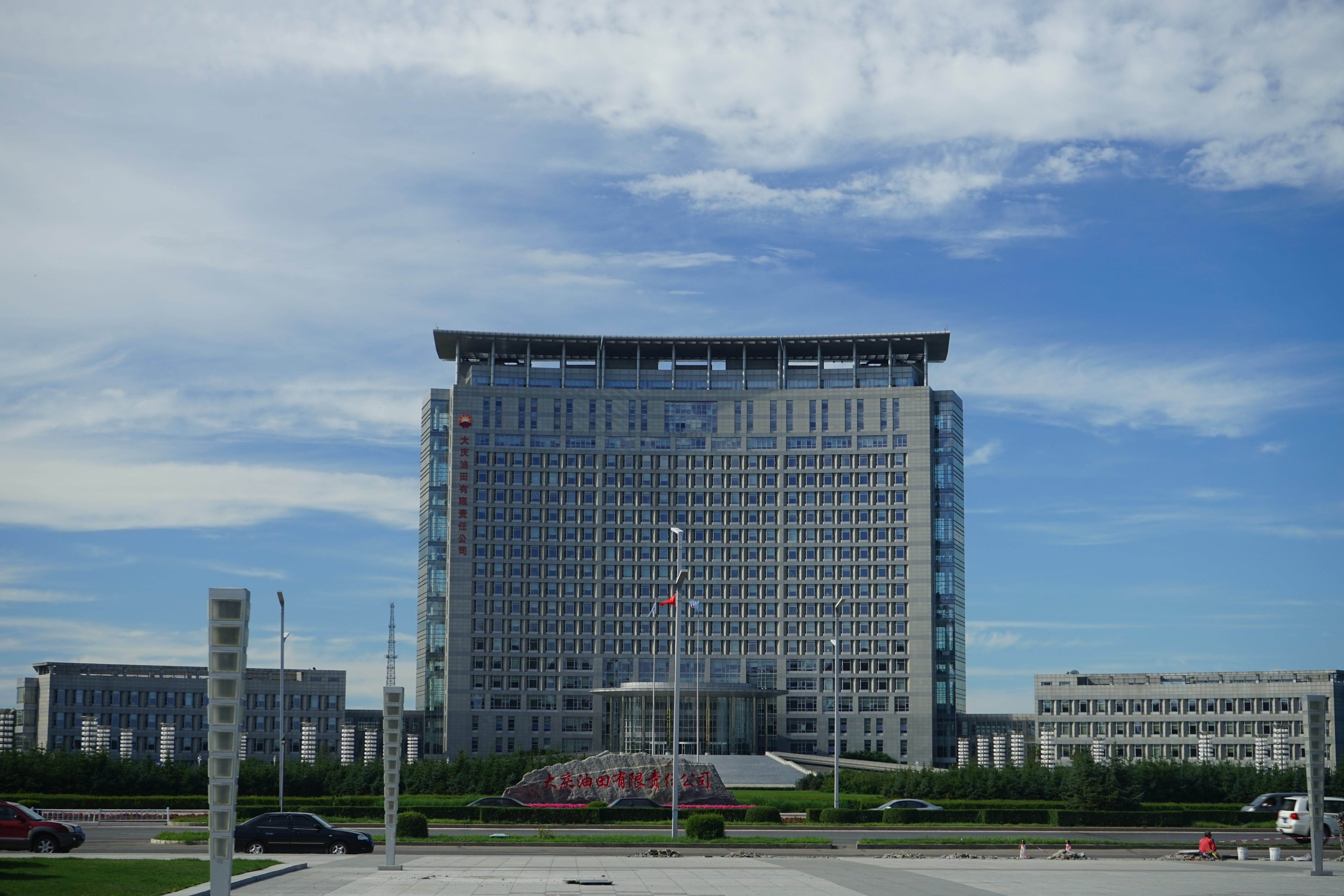 中文（中国大陆）: 大庆油田有限责任公司大楼